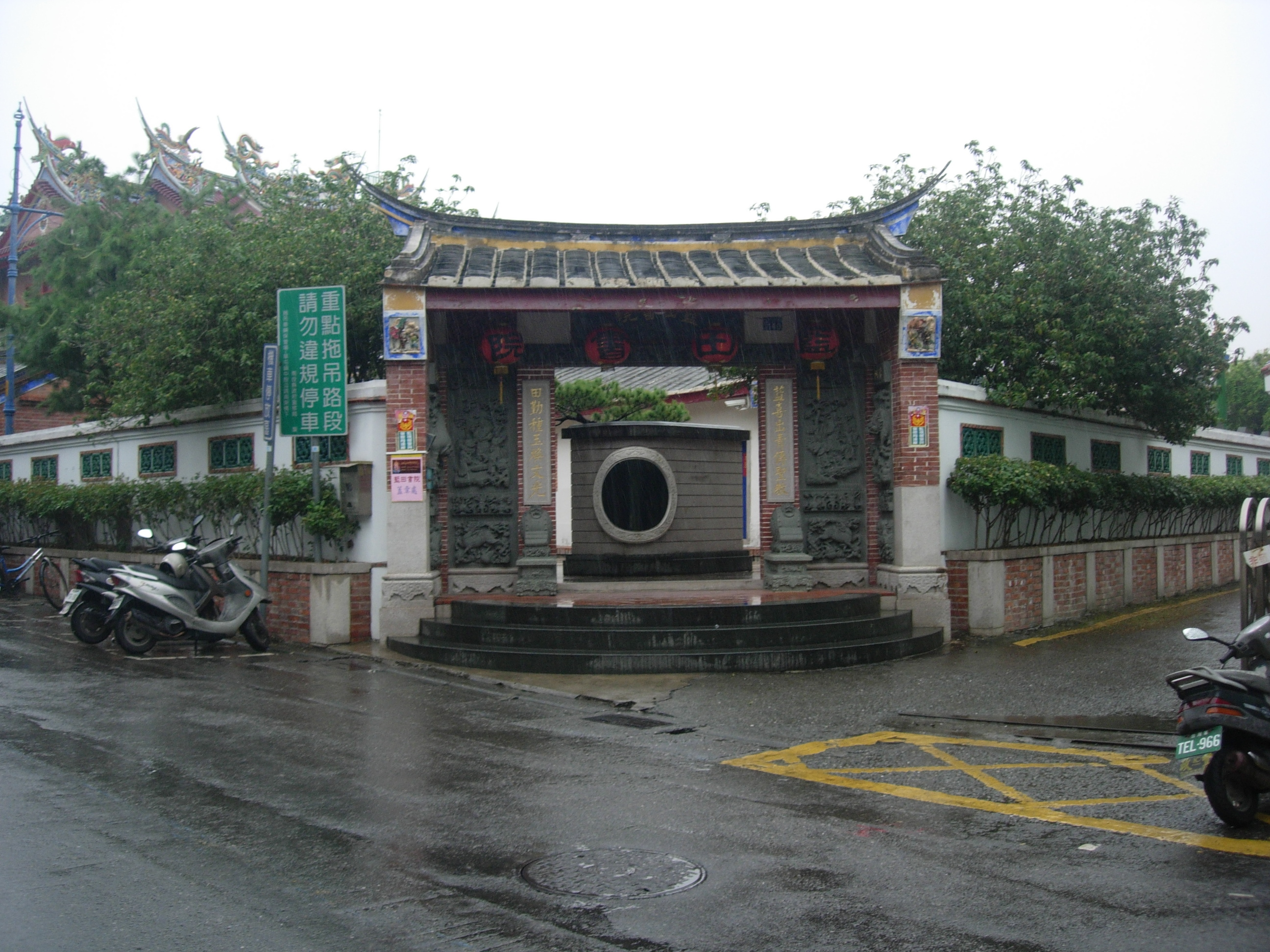 中文（台灣）: 藍田書院正門